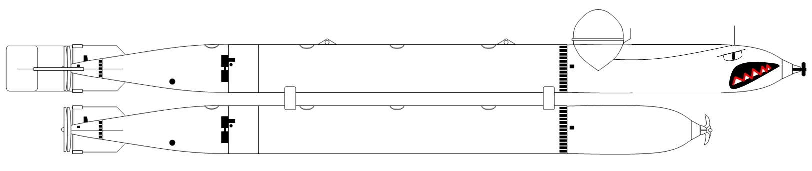 Kleinst-U-Boot Marder mit "Kriegsbemalung"